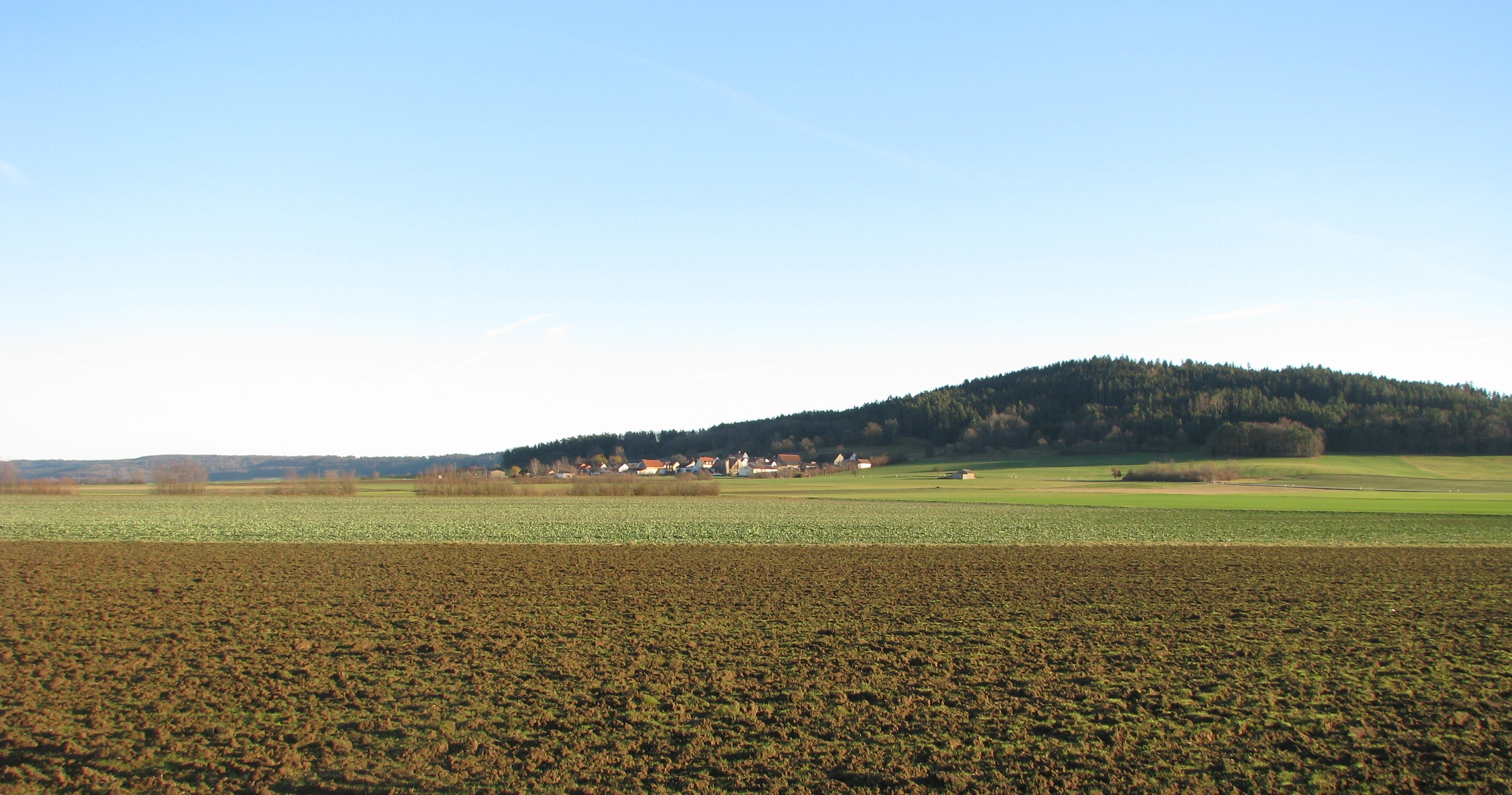 Tandl, Ortsteil von Hilpoltstein Im mittelfränkischen Landkreis Roth